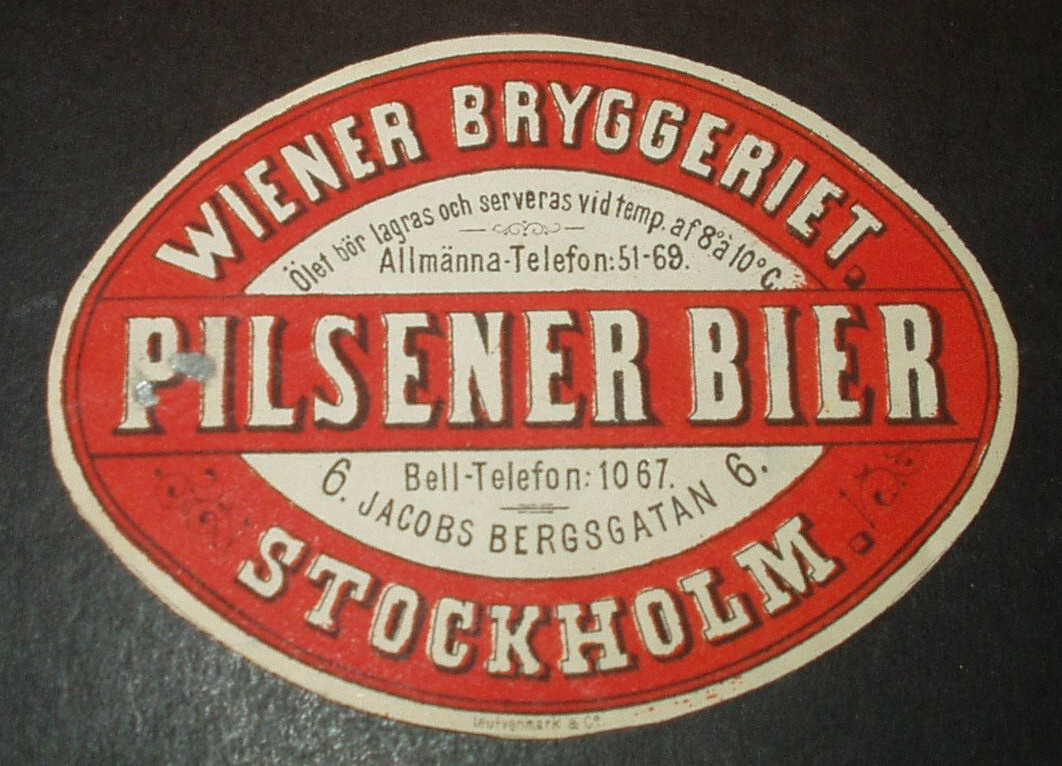 Wiener Bryggeriet. etikett för Pilsener Bier